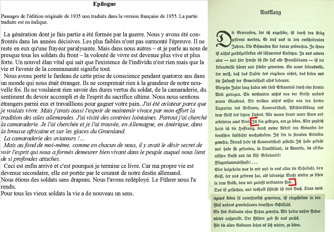 Comparaison de la traduction allemand-français de l'épilogue du livre autobiographique Ma vie et mes vols de Ernst Udet (Mein Fliegerleben)